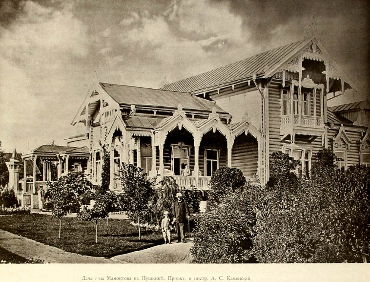 Mamontov Cottage, near Moscow